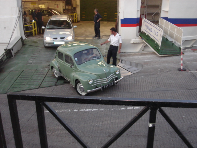 4CV sortant du ferry, port de Palais (56)